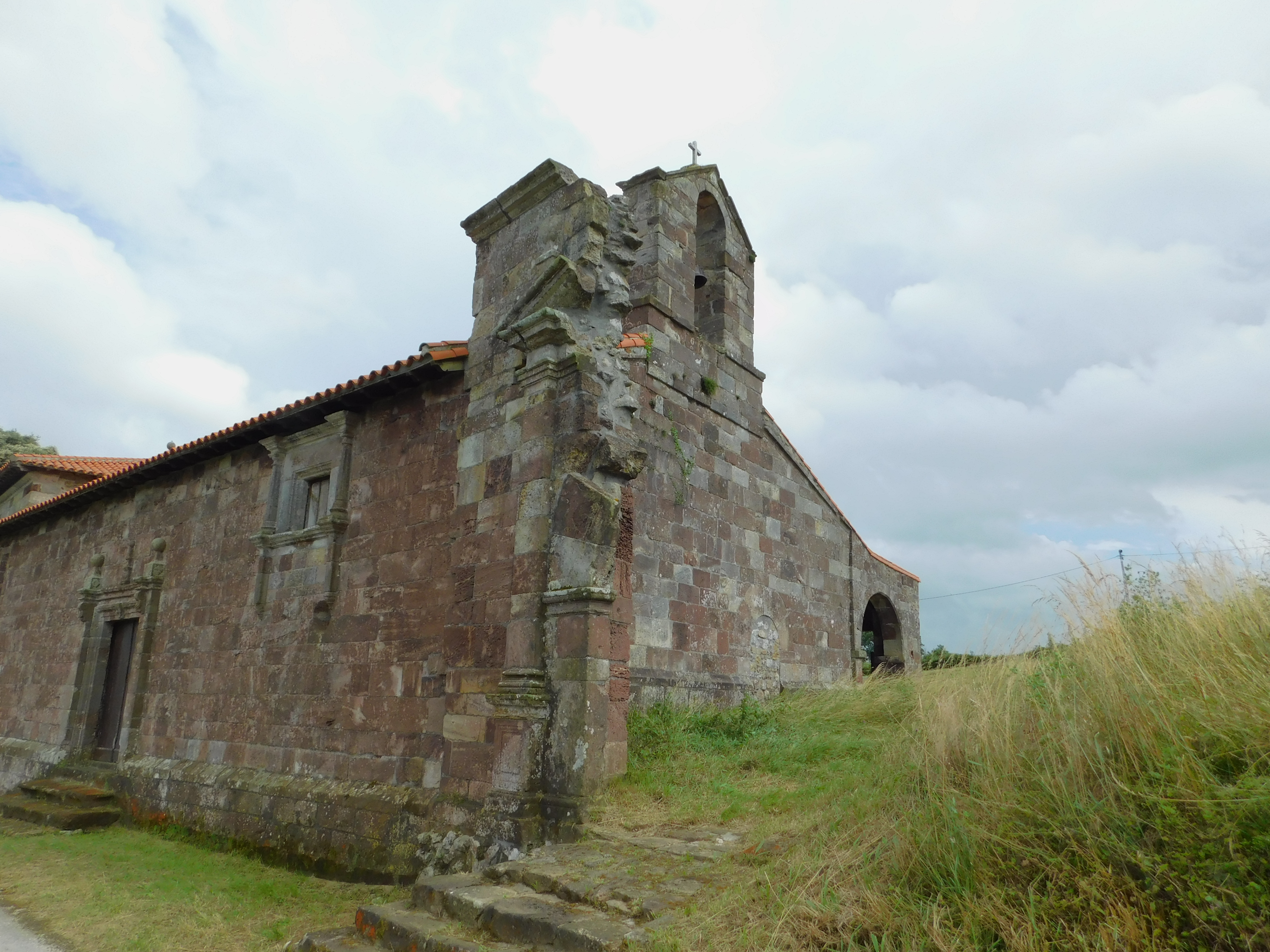 Trozo del Arco Lateral de la Ermita de San Pantaleón